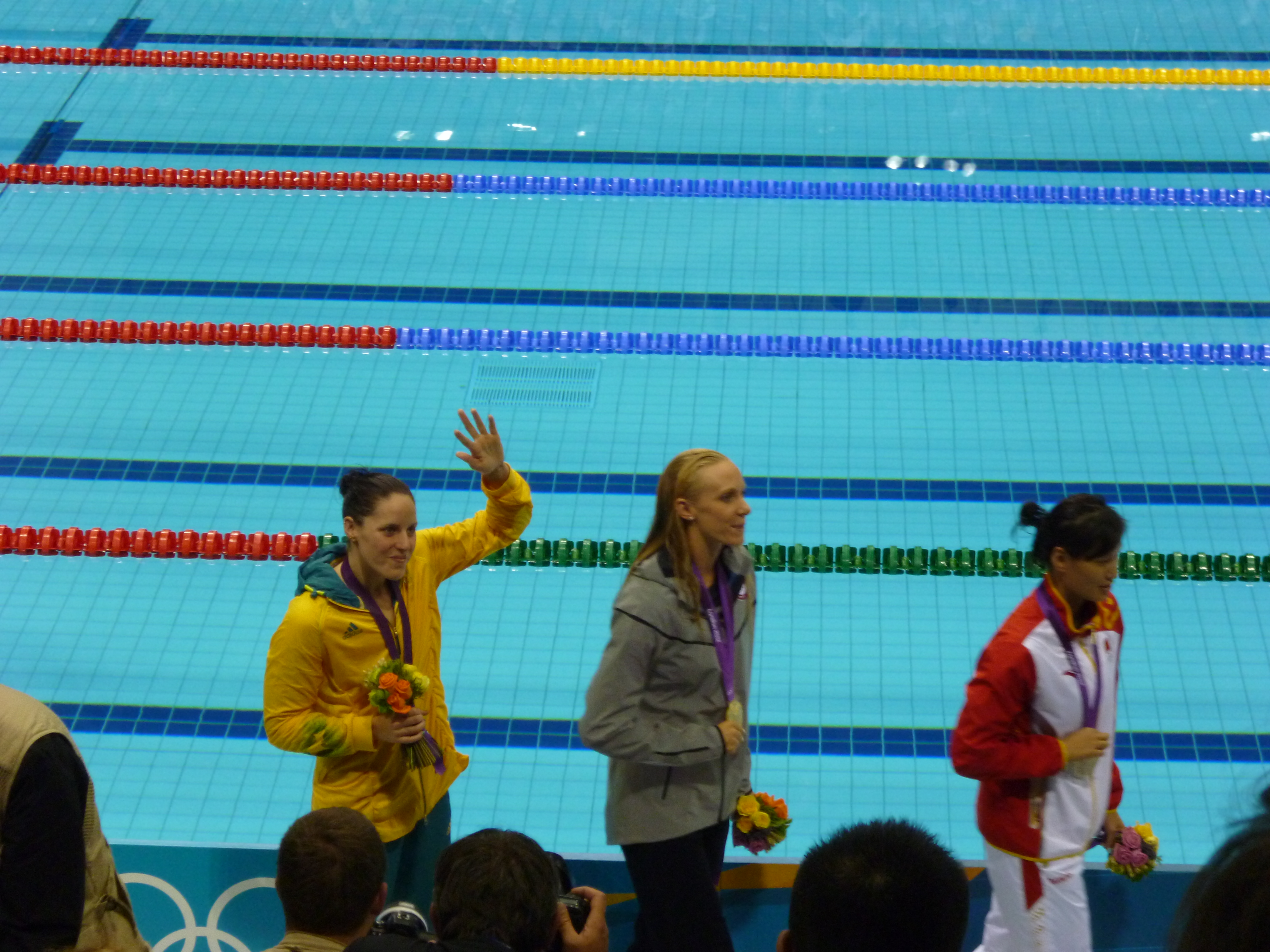 Dana Vollmer, Lu Yings y Alicia Coutts